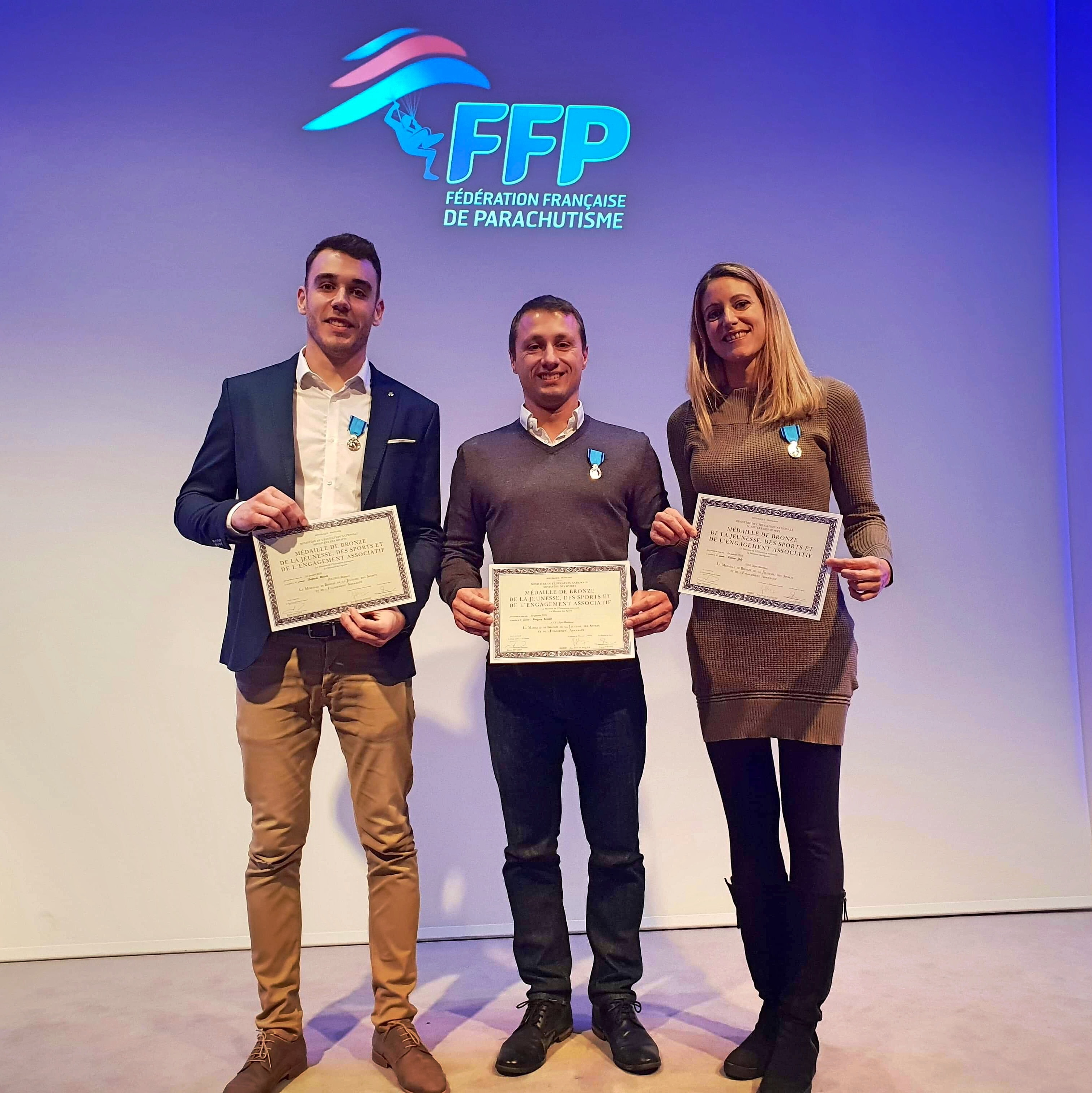 L'équipe de France 2018 de freefly, composée de Greg Crozier, Karine Joly et Baptiste Welsch, reçoit la médaille de Bronze du ministère des sports à l'aéro club de France